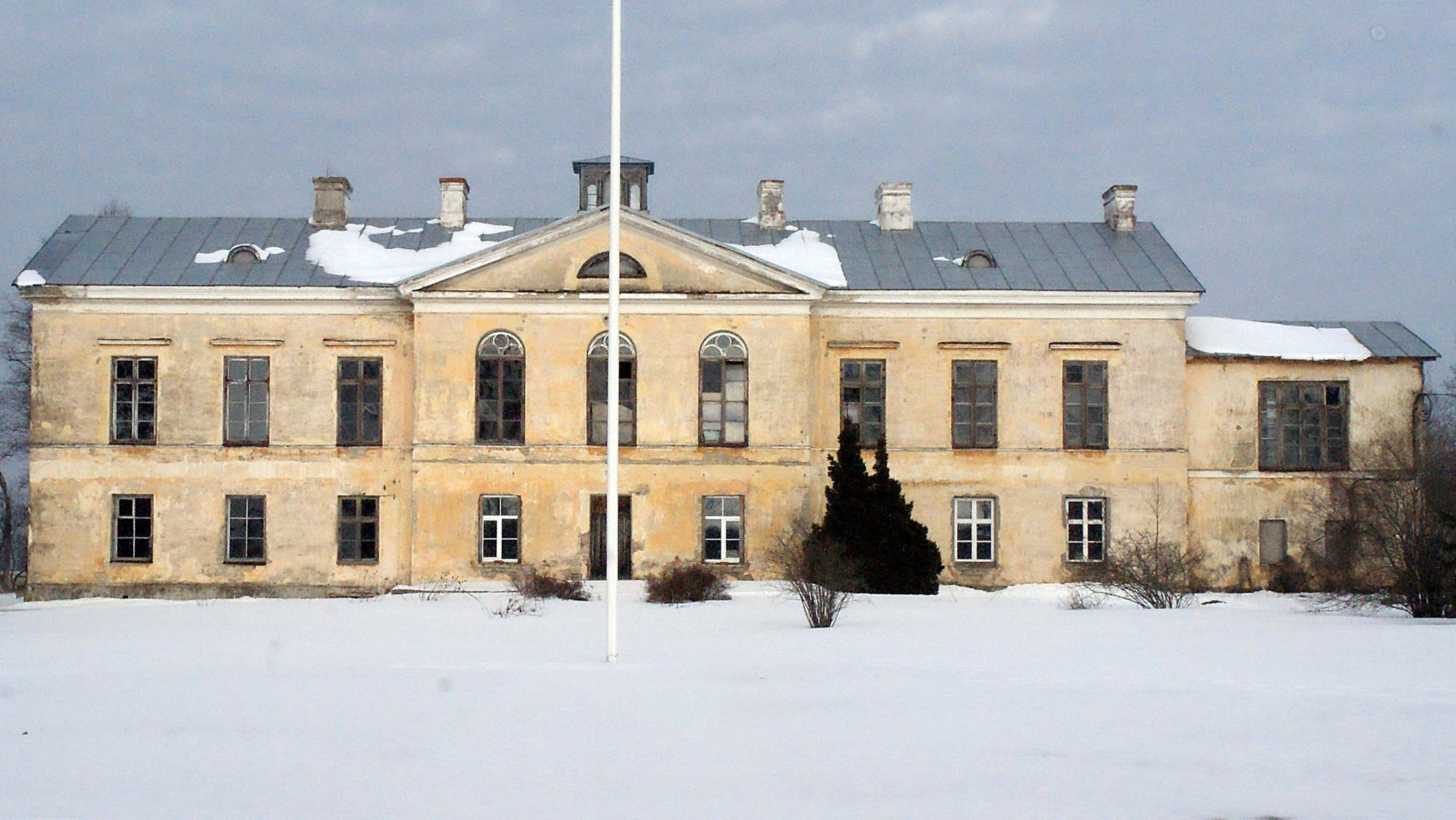 Ontika mõisa peahoone